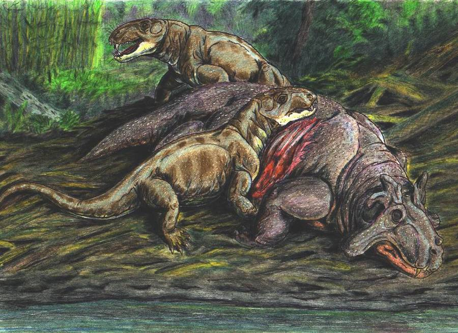 Archaeosyodon- reconstruction autor - Bogdanov